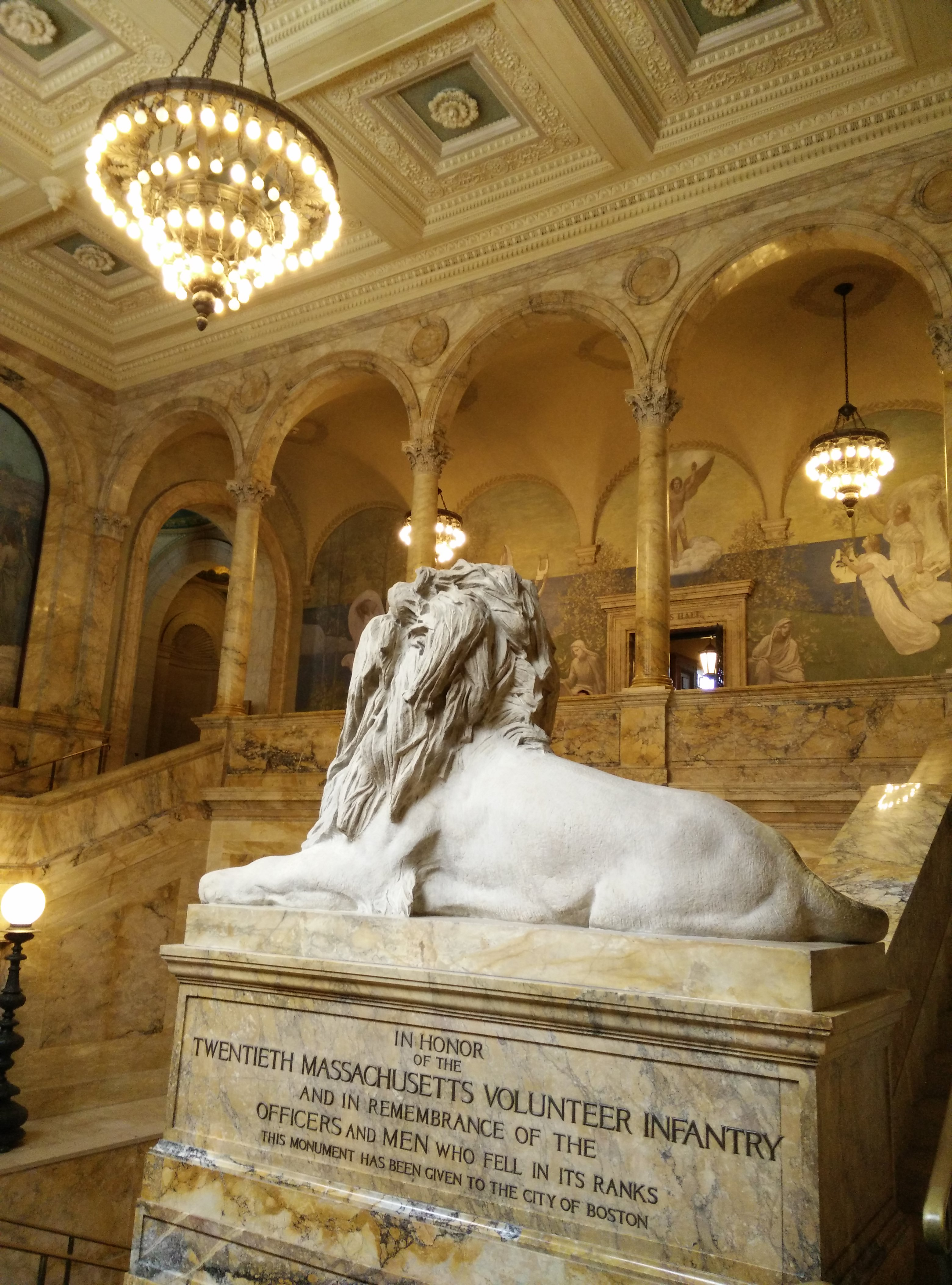 הספריה הציבורית בבוסטון